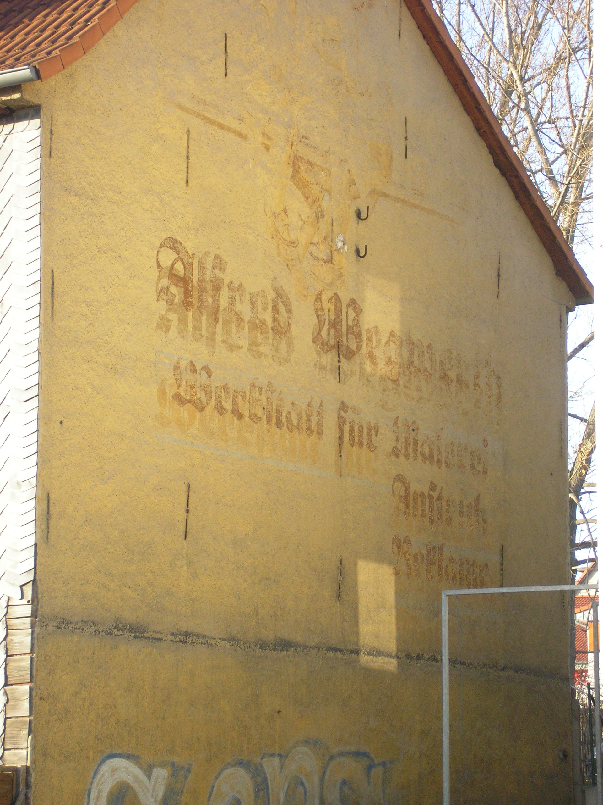 Wandreklame des ehemaligen Malerbetriebs von Alfred Wegwerth in Ilmenau (Thüringen).